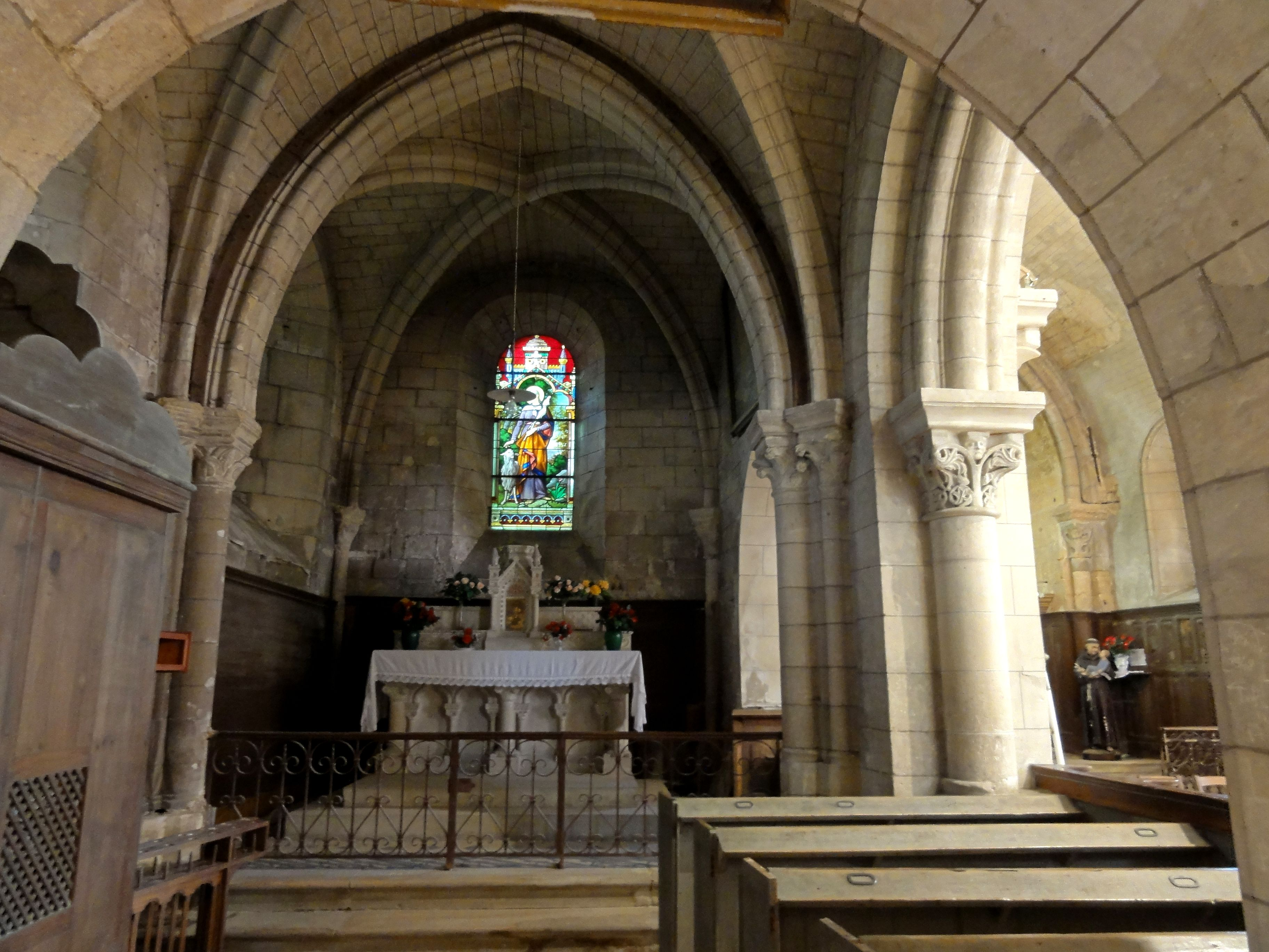 Chapelle nord, vue vers l'est.